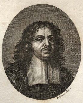 Antonio Cararrio, poète italien né à Nardò en 1630 et mort à Rome en 1702.